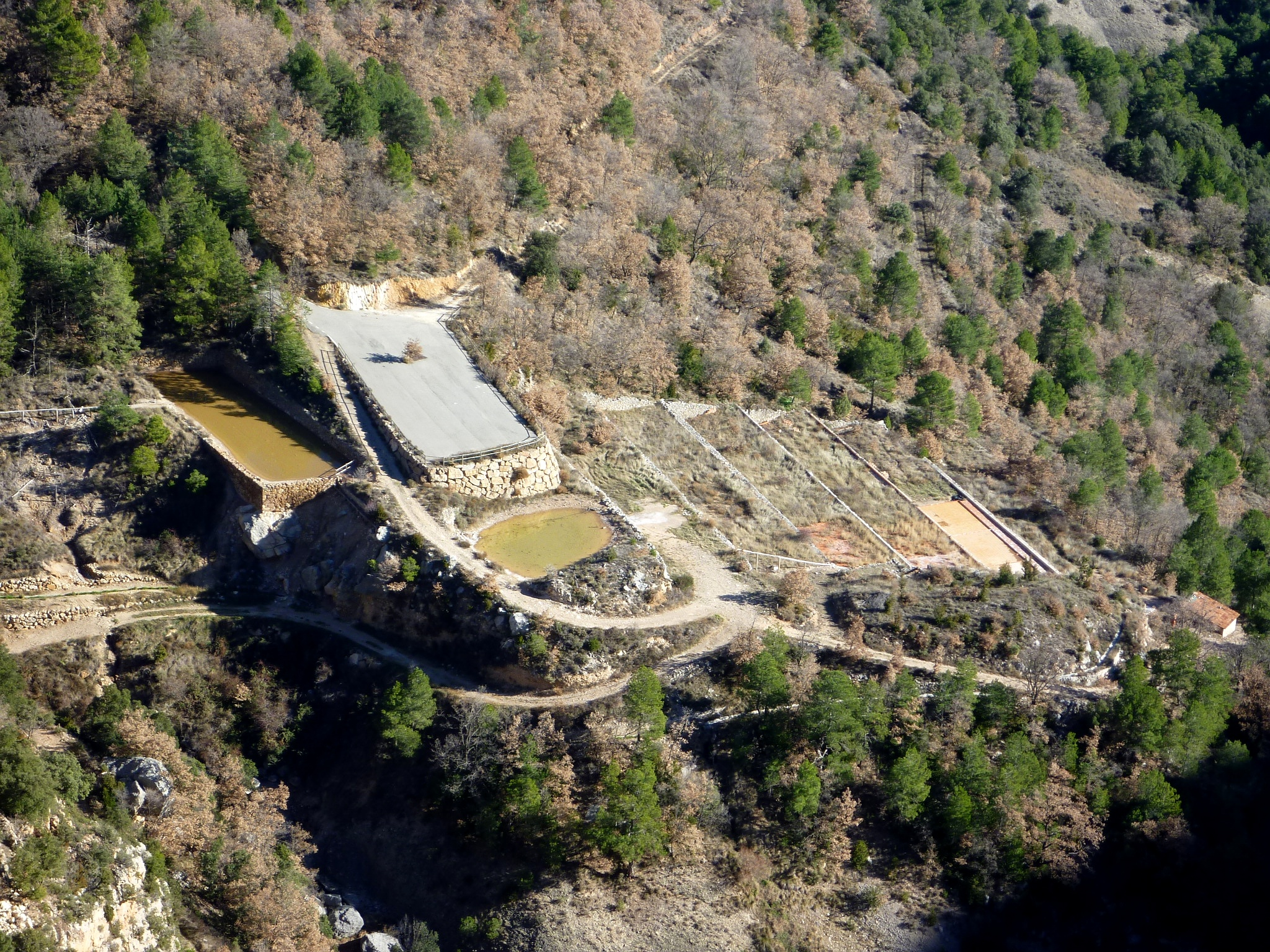 Salí de Cambrils (Odèn): bancals d'evaporació vistos des del castell